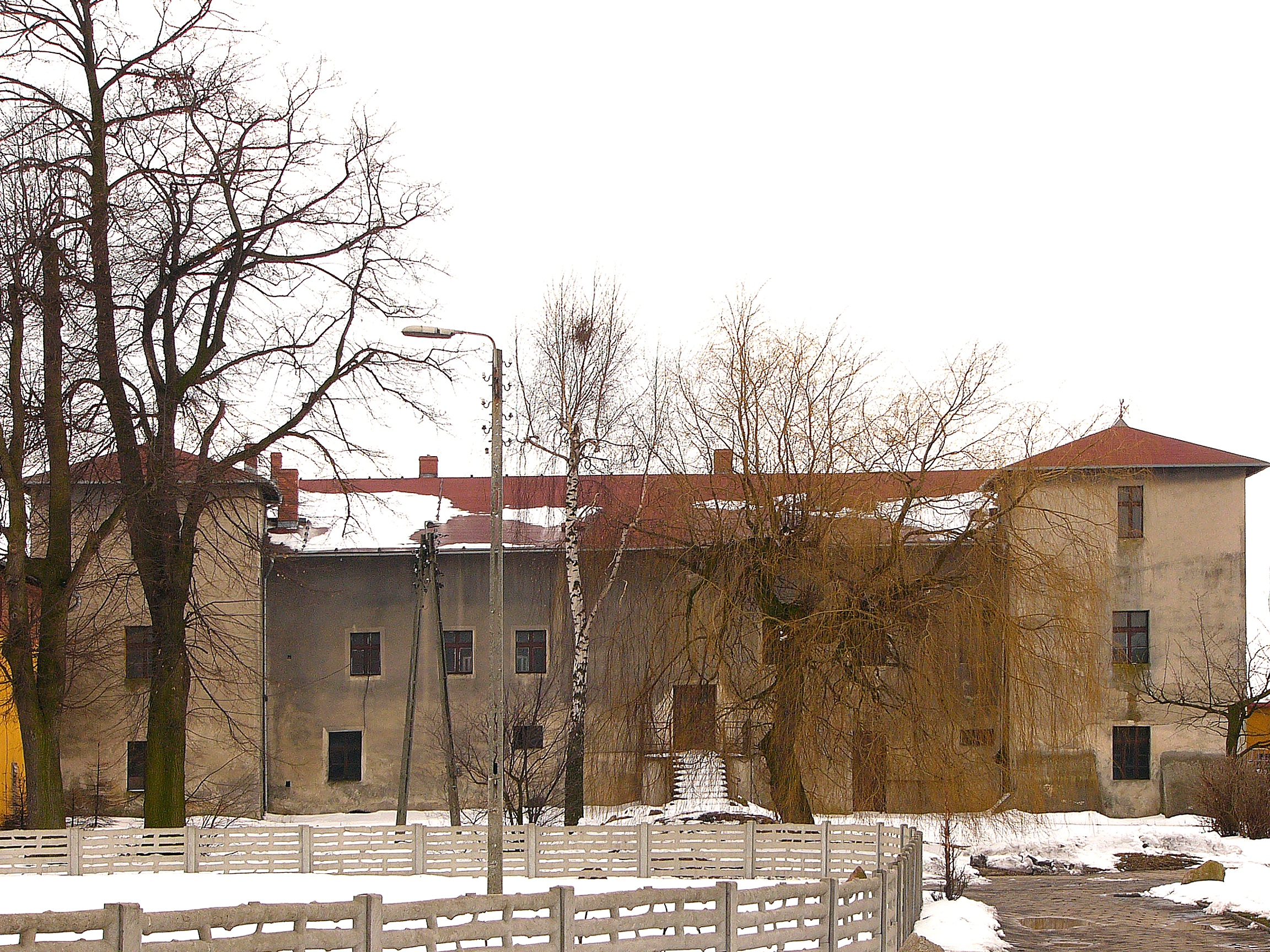 Pałac Wieszowa, Zbrosławice